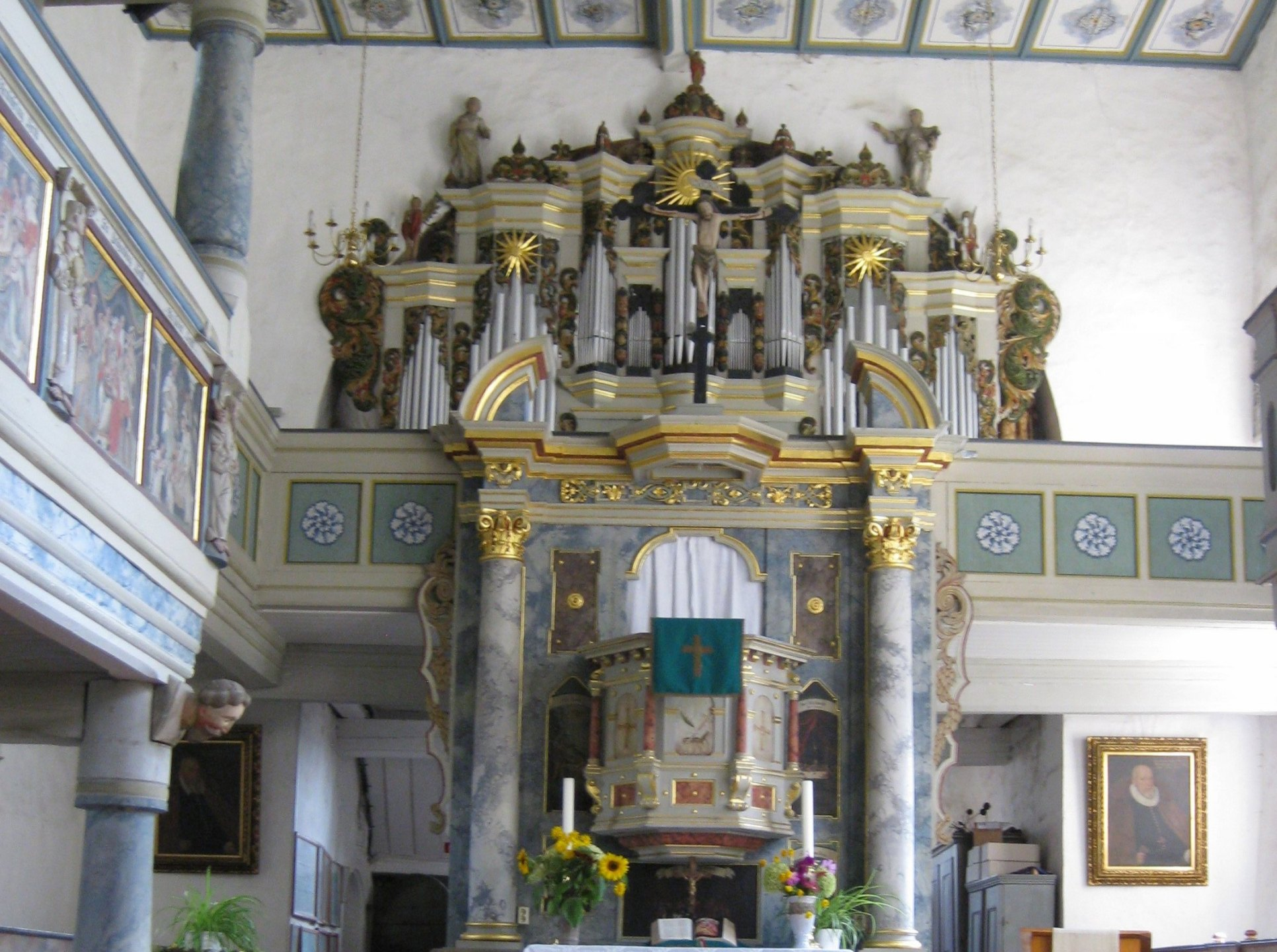 Rohr St. Michaelis